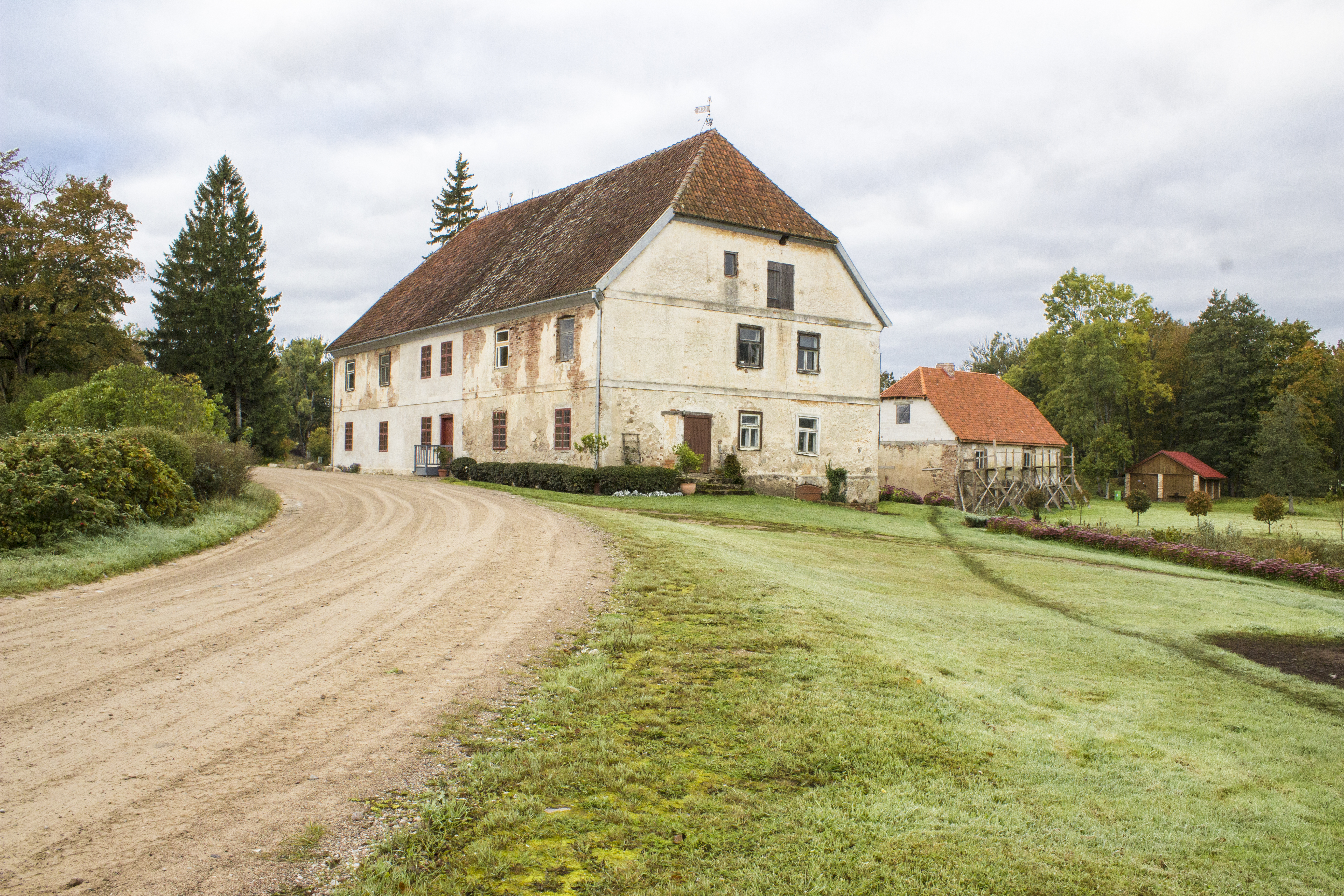 Tāšu muiža / manor